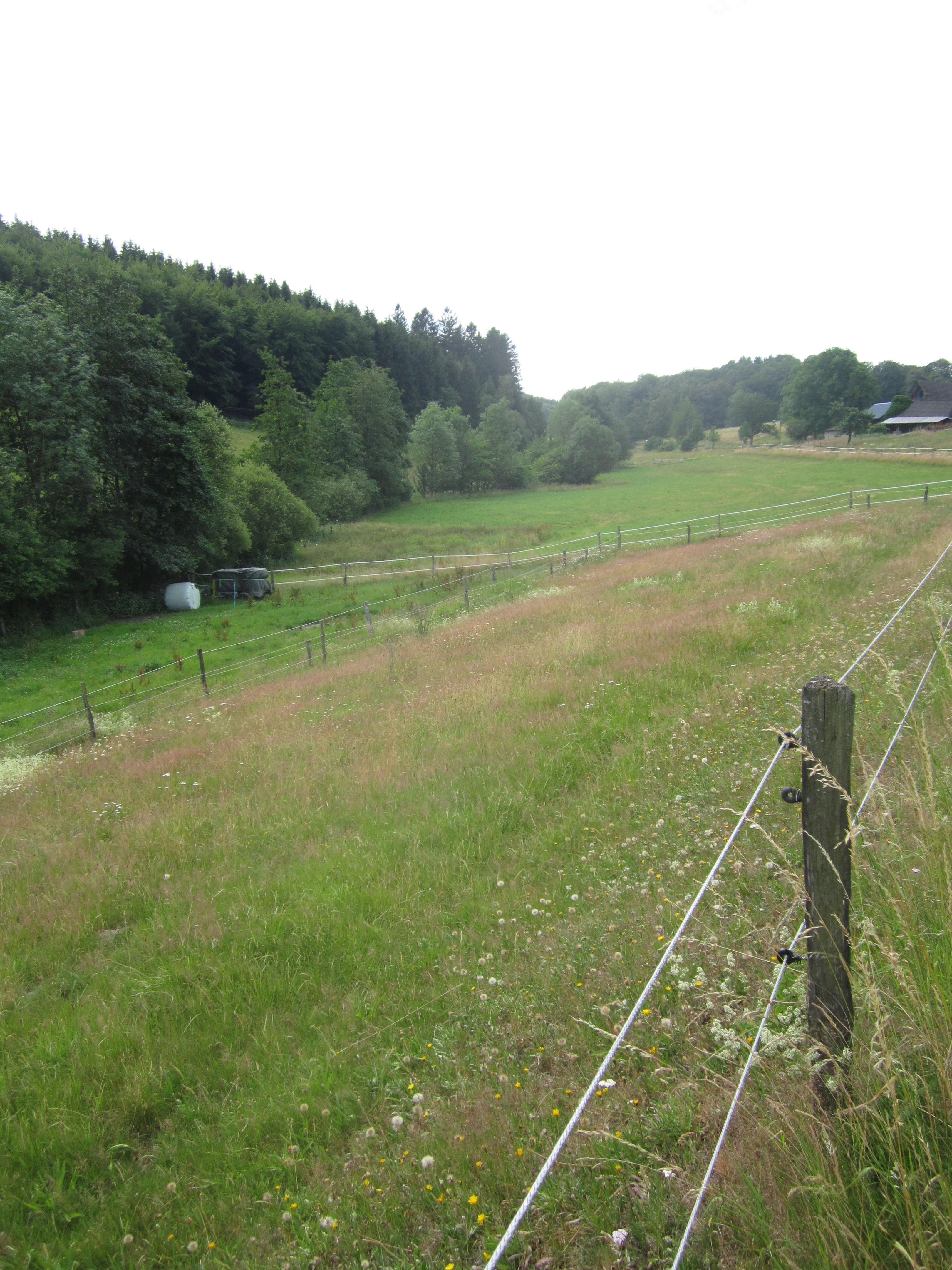 NSG Feldbachtal mit Feldbach und Oberfeldbach im Hintergrund.